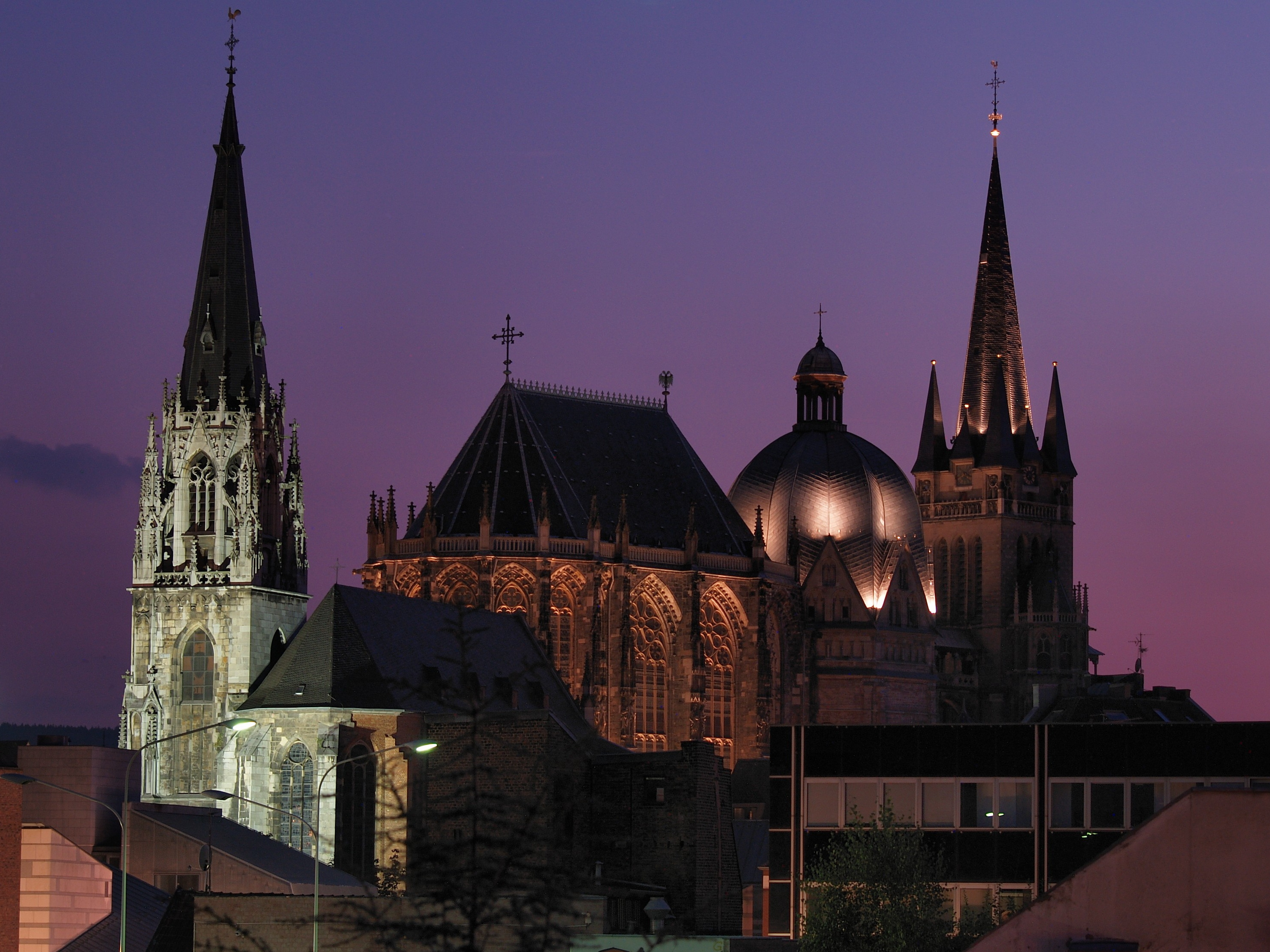 Dächer des Aachener Doms in der späten Dämmerung in Aachen, Denkmal